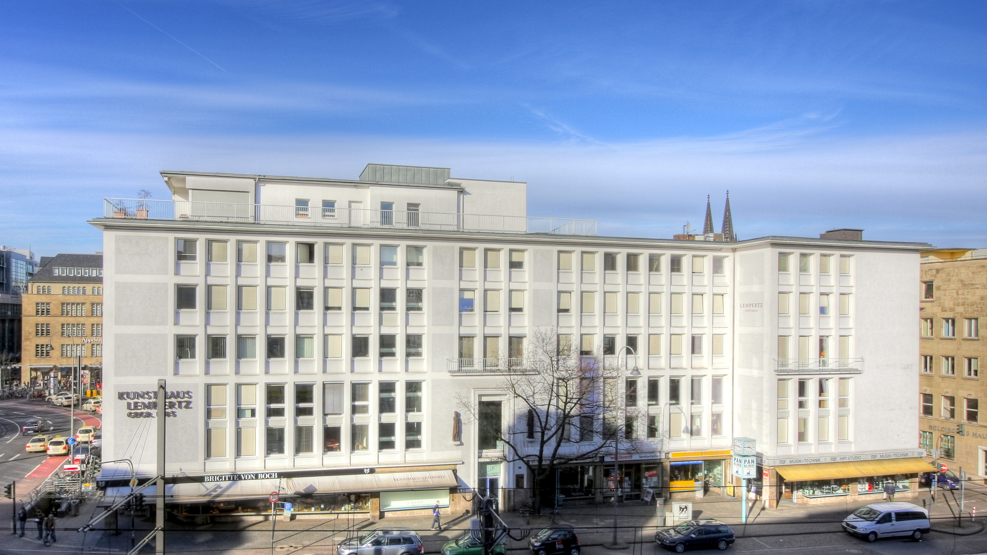 Kunsthaus Lempertz, Neumarkt 3/Cäcilienstr. 48, 50667 Köln